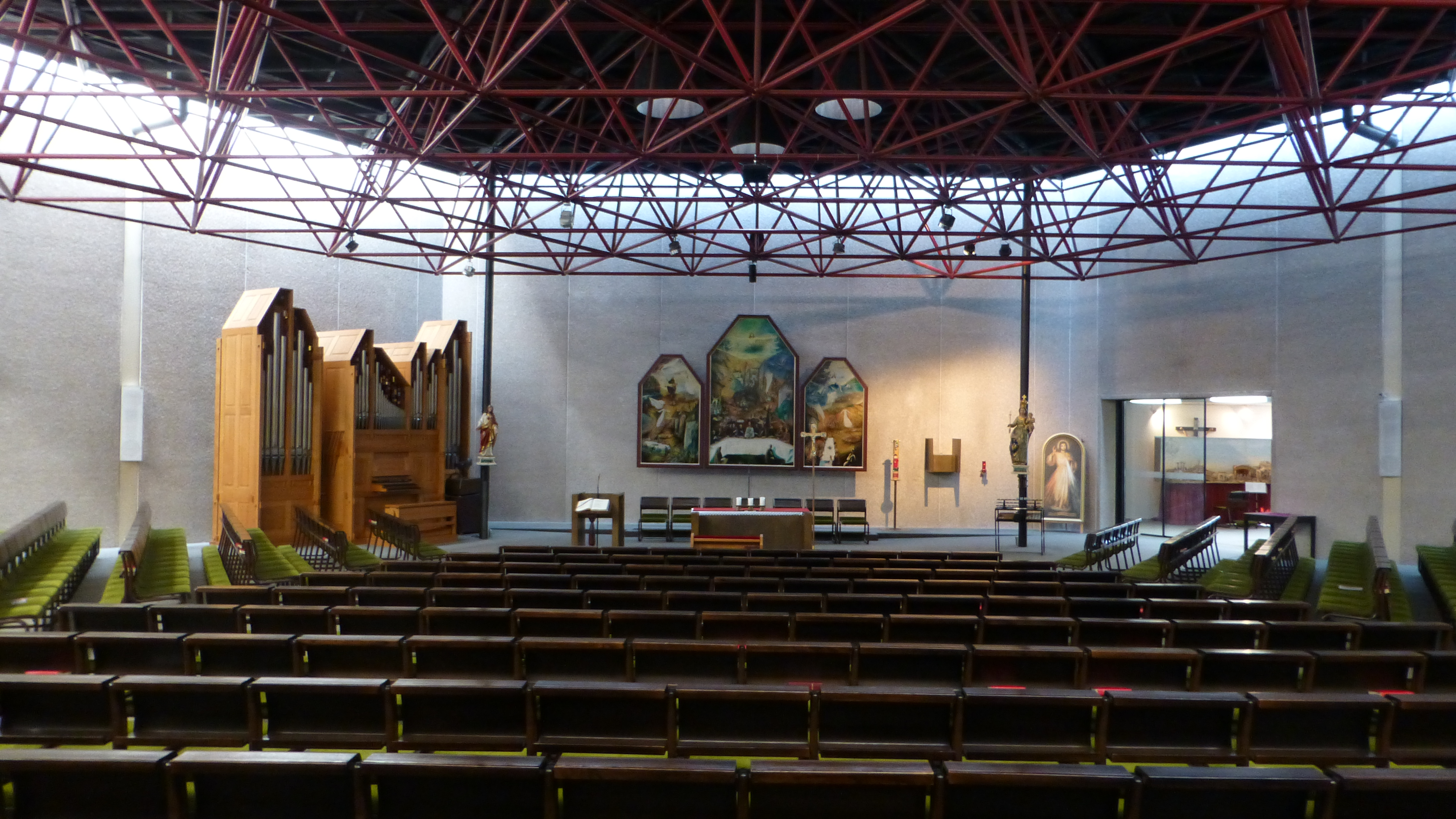 Innenansicht der Guthirtenkirche in Lustenau